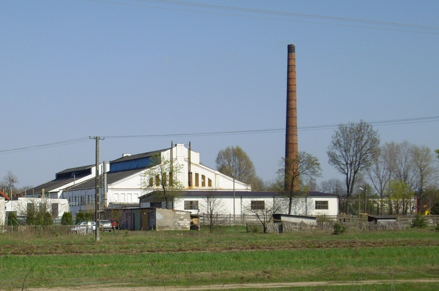 Huta Dąbrowa. Huta szkła „Dąbrowa”, widok jednego z budynków fabryki.